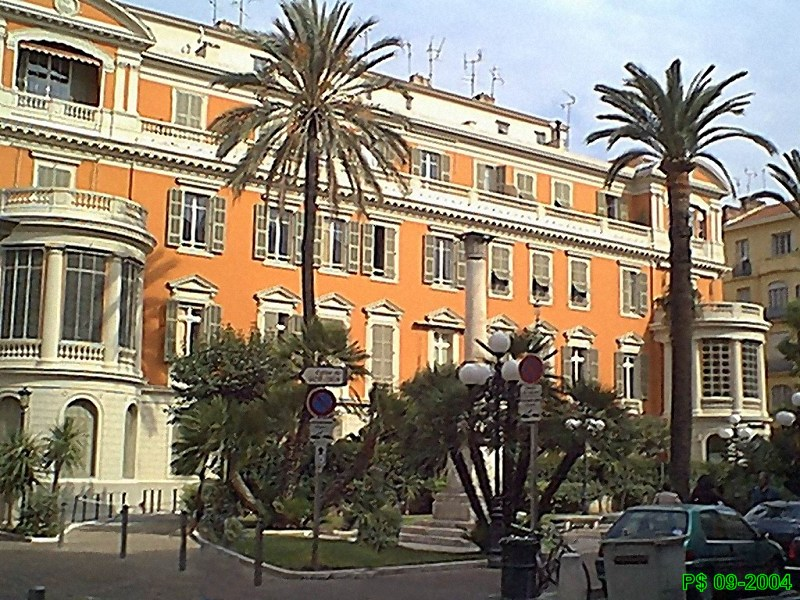 Palais Marie-Christine. 20 Rue de France. Direction NE.